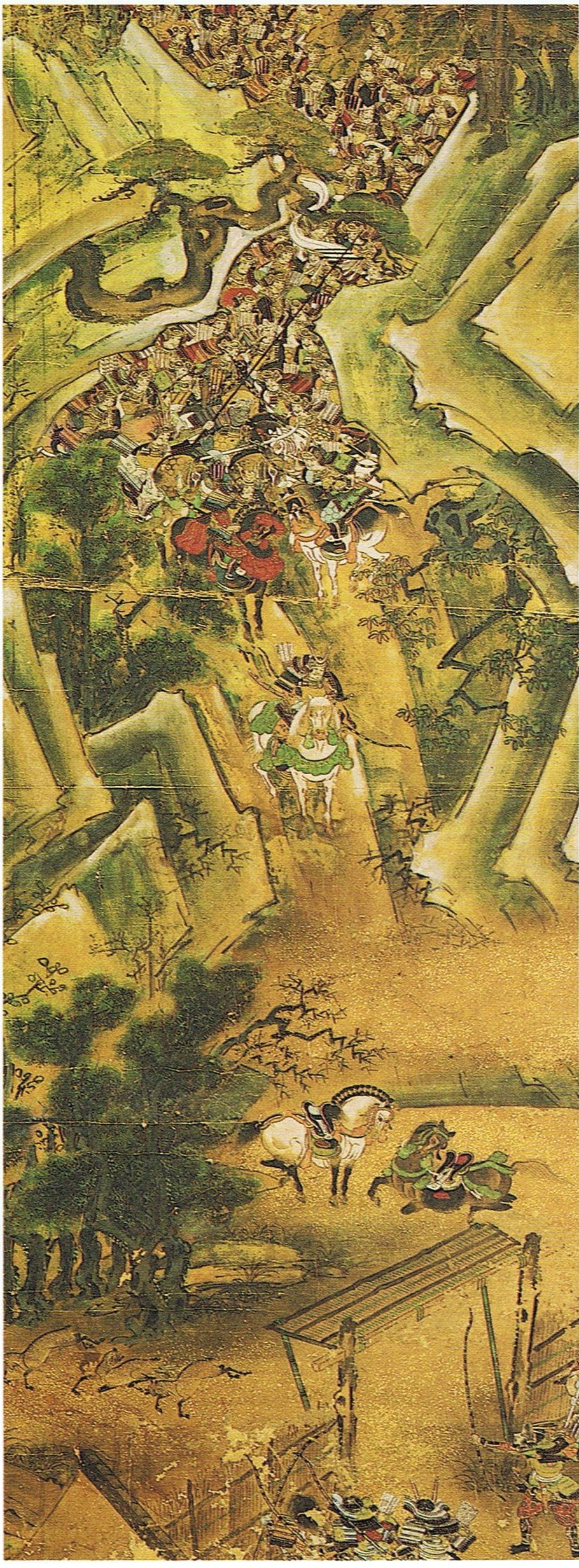 第四巻「一の谷合戦」鷲尾三郎義久の案内で一の谷に到着。義経軍の鵯越の逆落とし。